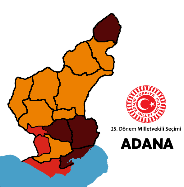 2015 genel seçim sonuçları